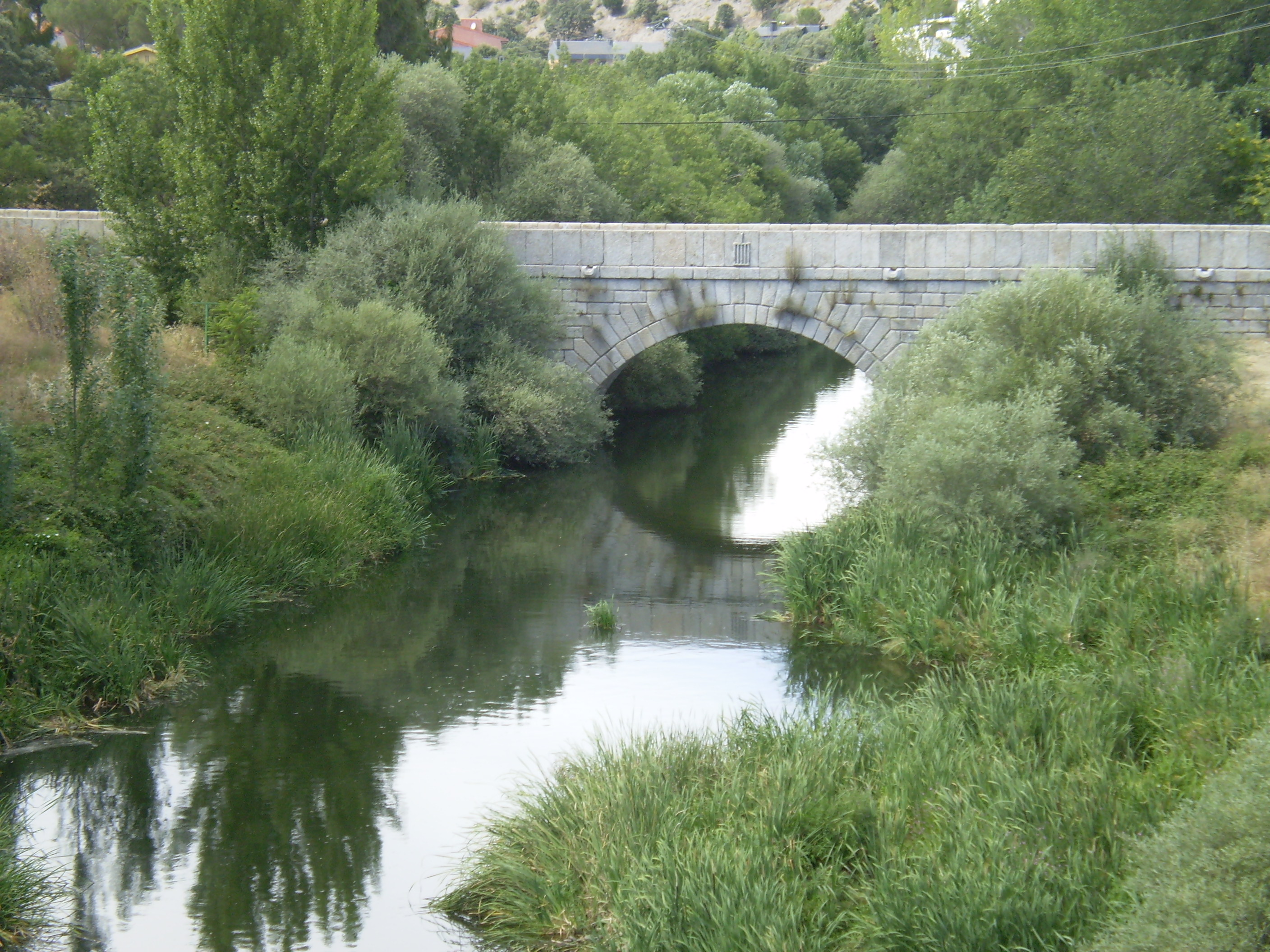 Río Guadarrama. Comunidad de Madrid, Spain